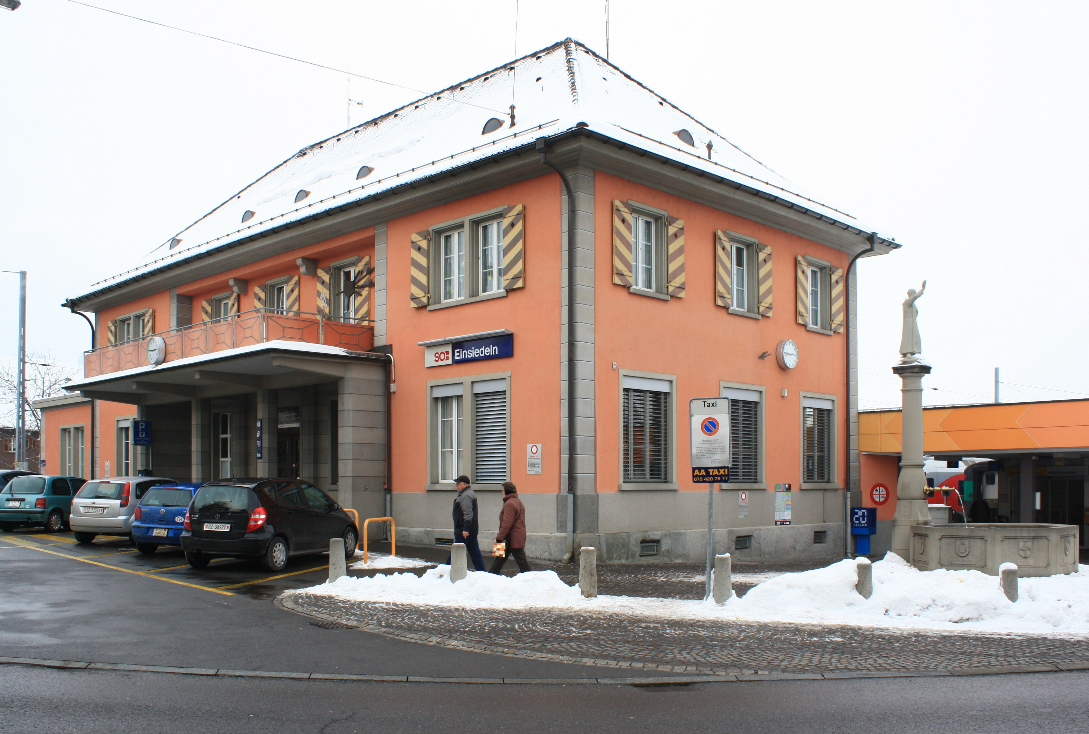 Einsiedeln (SZ) in Switzerland